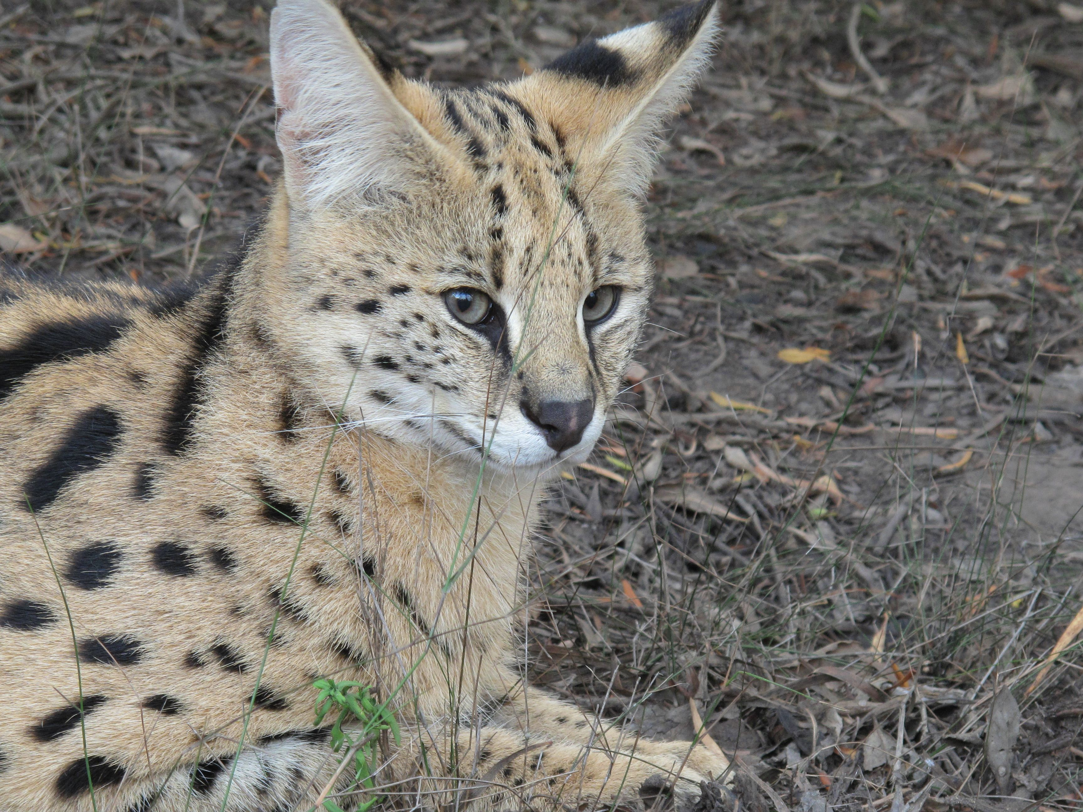 Serval Katze, Südafrika